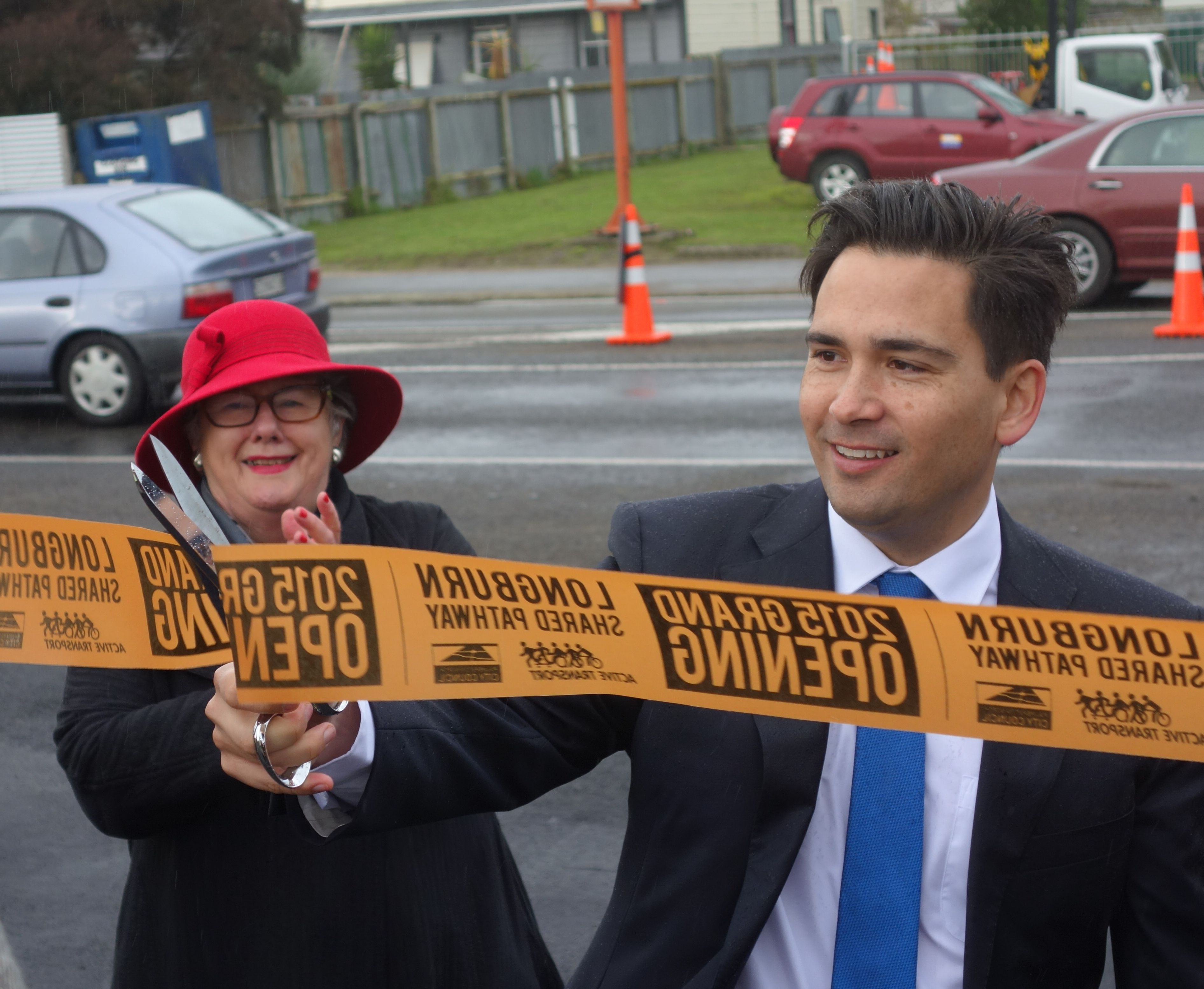 Transport Minister Simon Bridges